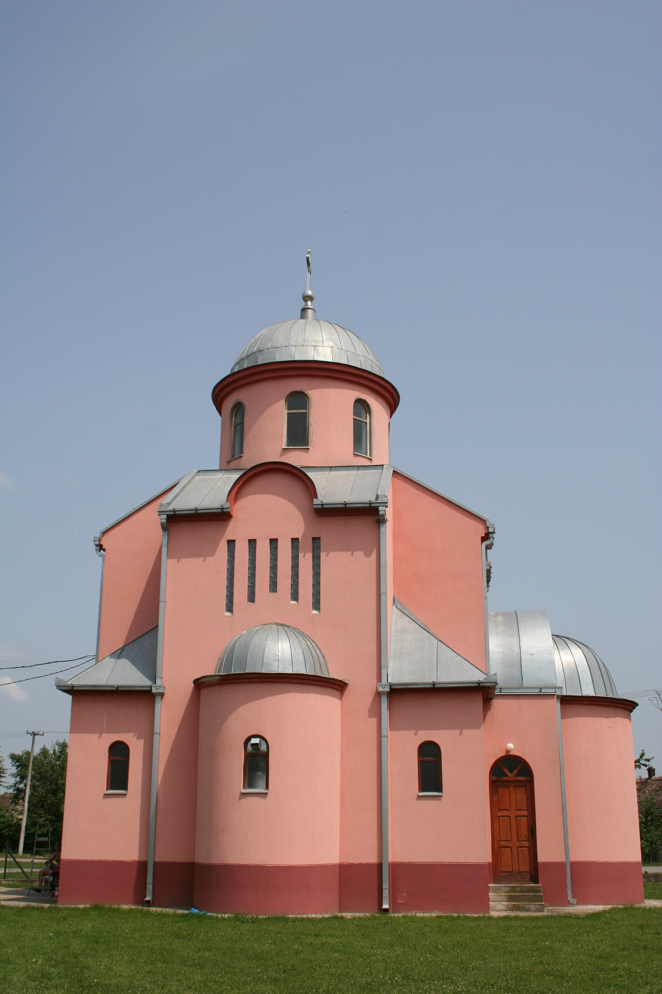 Crkva svih Svetih, Radenković